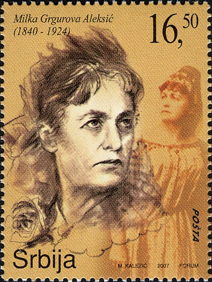 Great Serbian Actors - Milka Grgurova-Aleksić